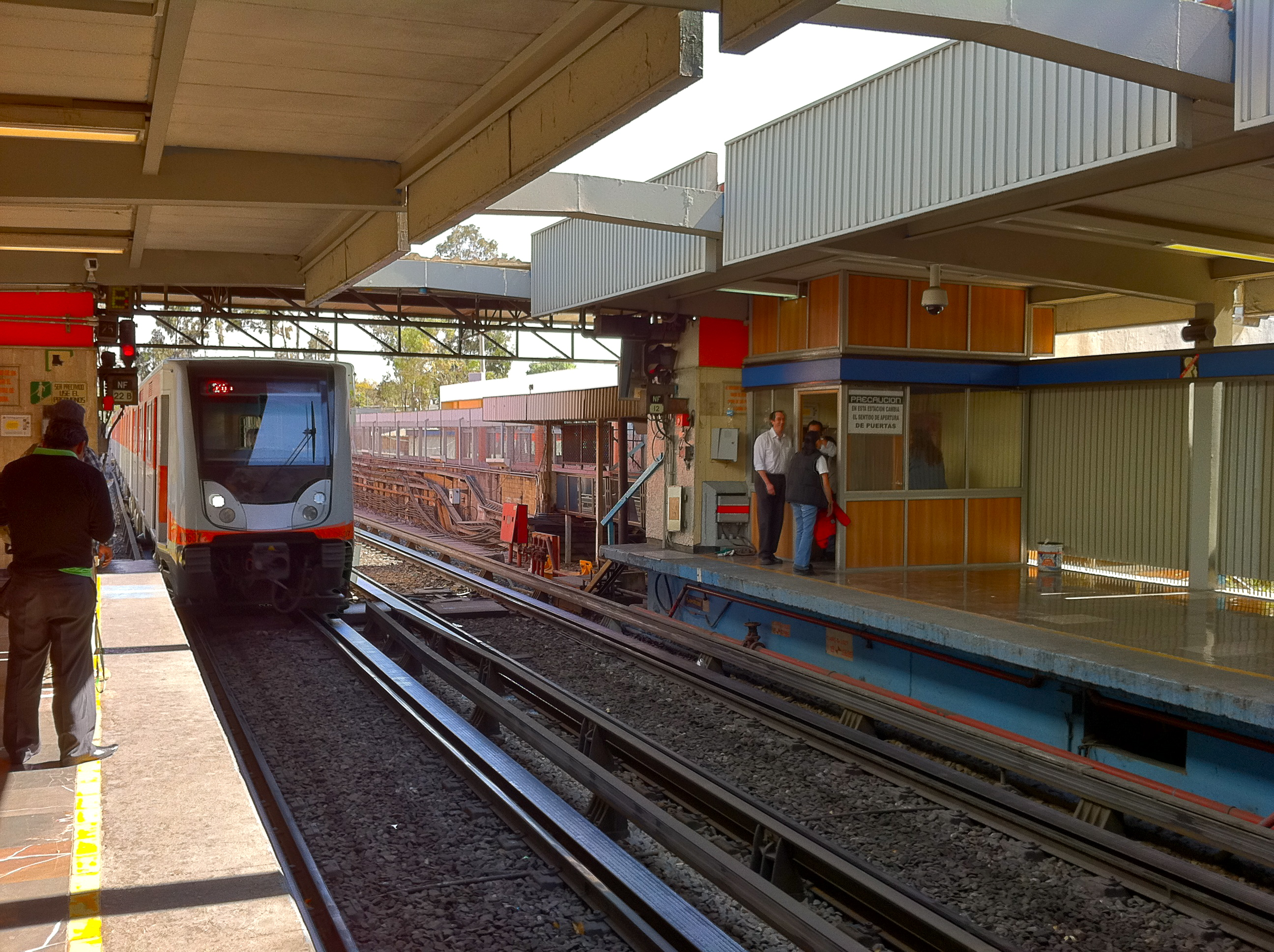 Terminal Taxqueña